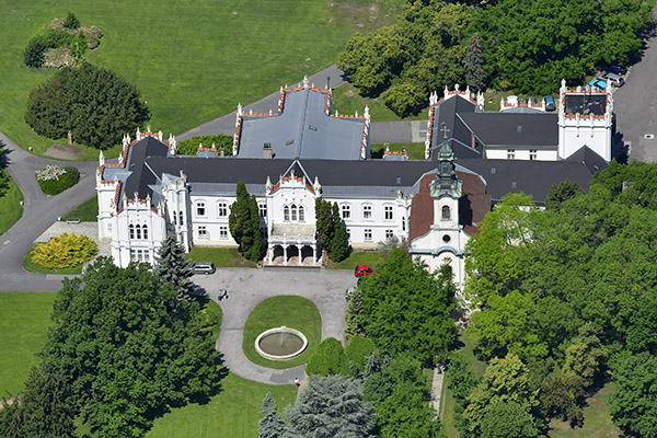 A Brunszvik-kastély a levegőből, Martonvásár